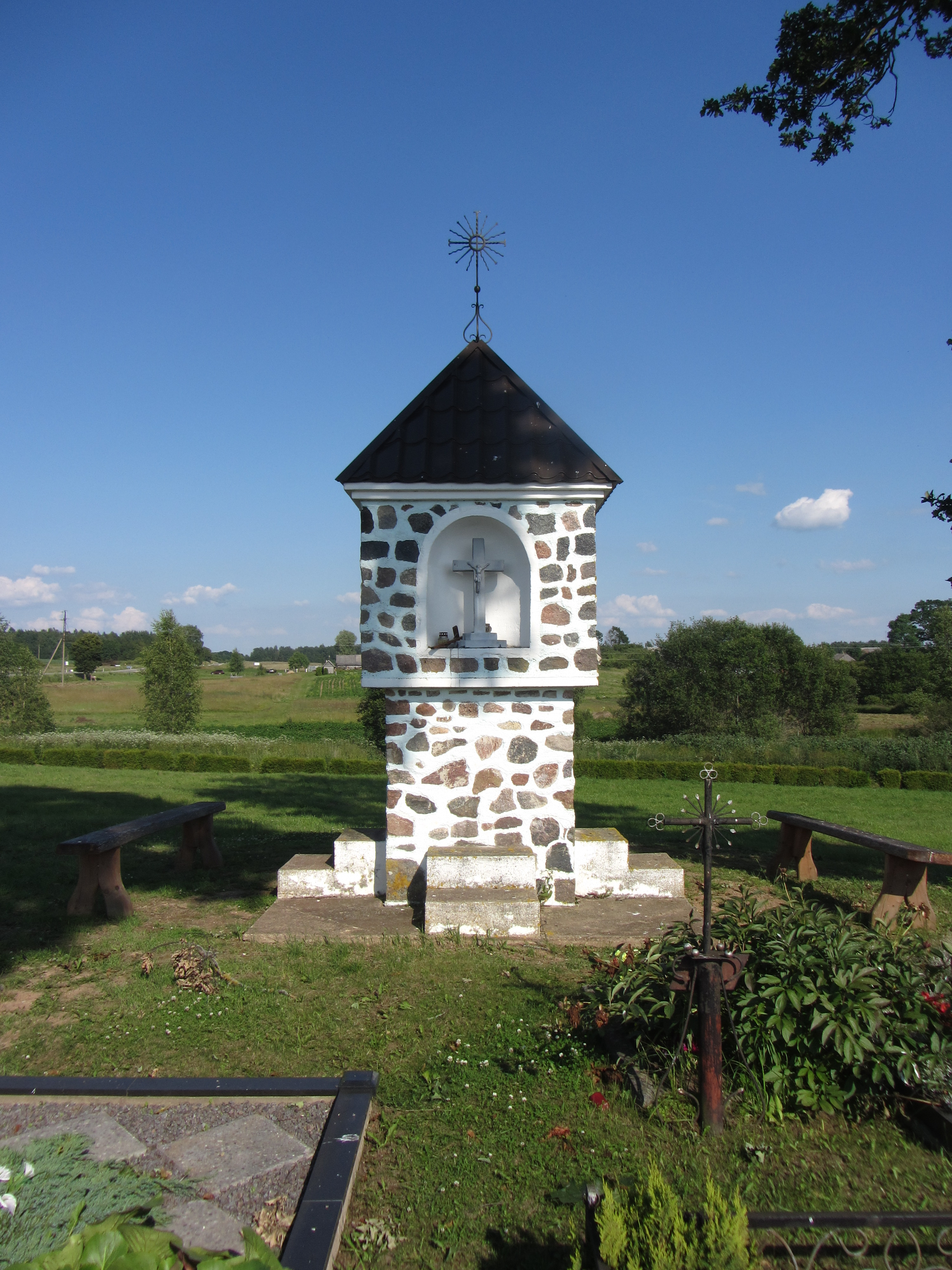 Svirkų sen., Lithuania